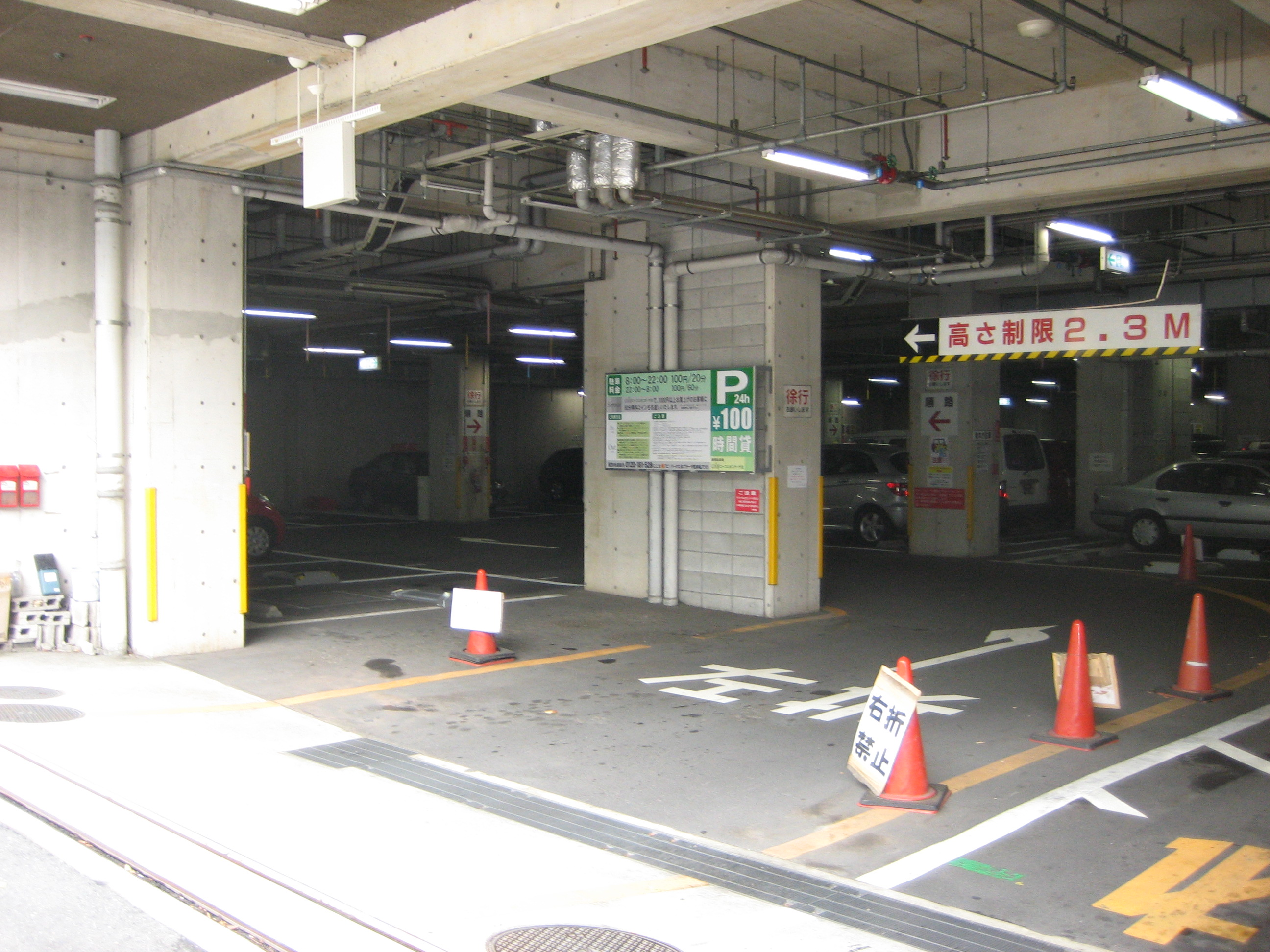 ﾋﾟ!パークたまプラーザ駐車場